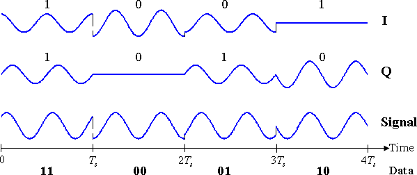 Data -vs- signal -vs- time diagram for π / 4 {\displaystyle \pi /4} -QPSK.